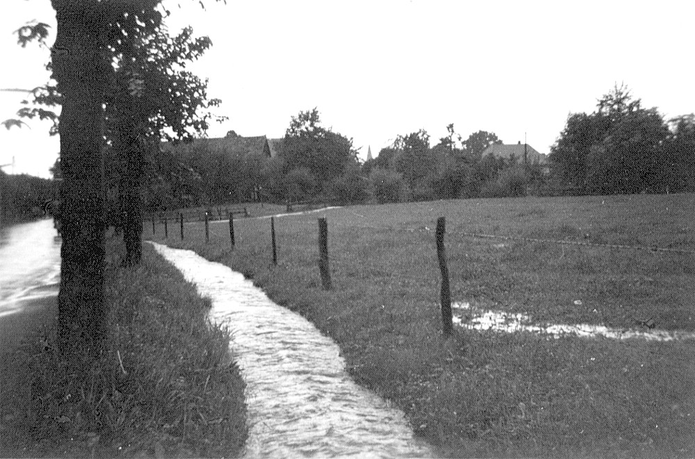 Großer Dieckfluss: Umgehungsgraben an der Bergstraße vor Krügers Mühle und dem Kirchturm Preußisch Oldendorfs. Nach Starkregen läuft auch der Mühlteich über.